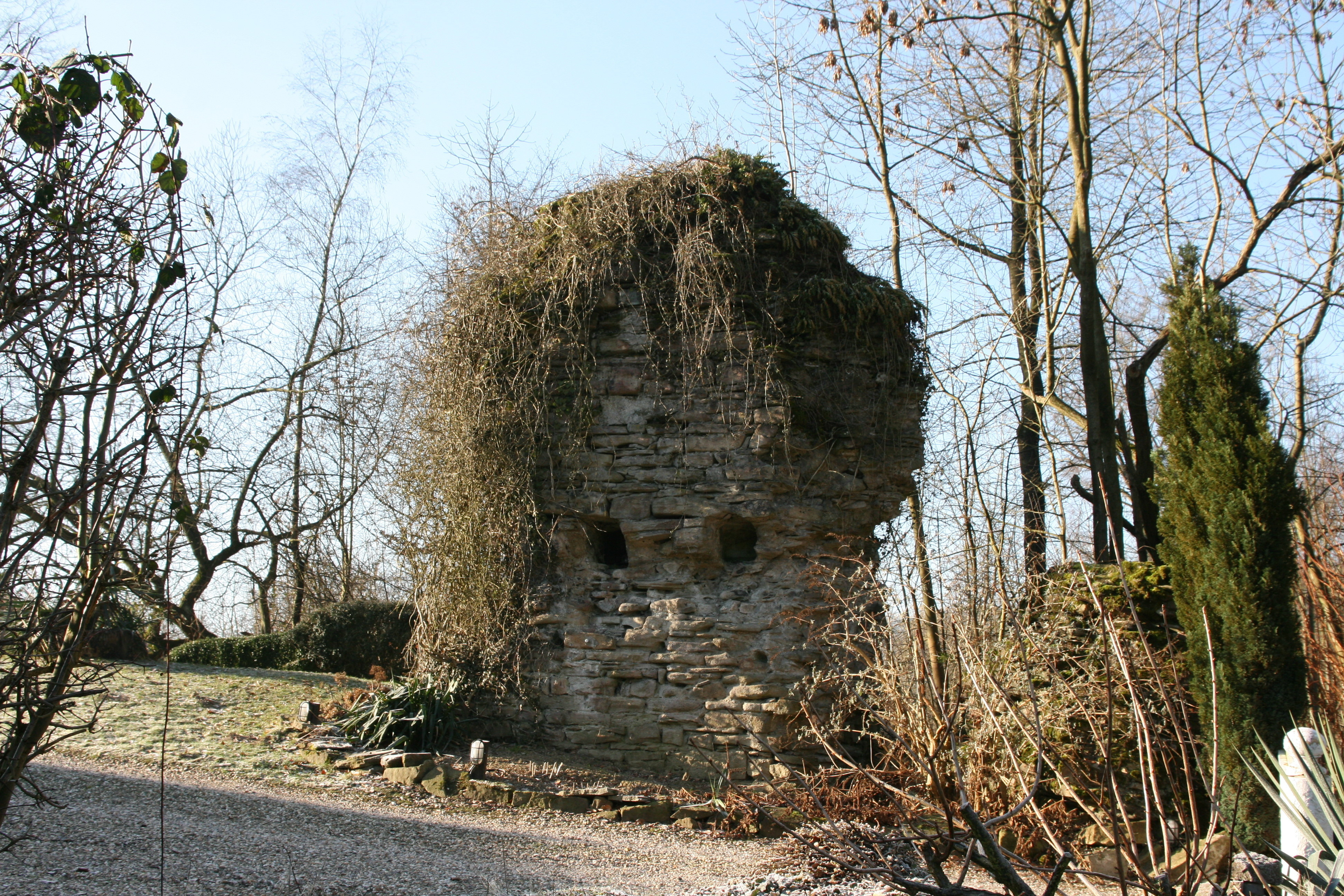 Neue Isenburg in Essen